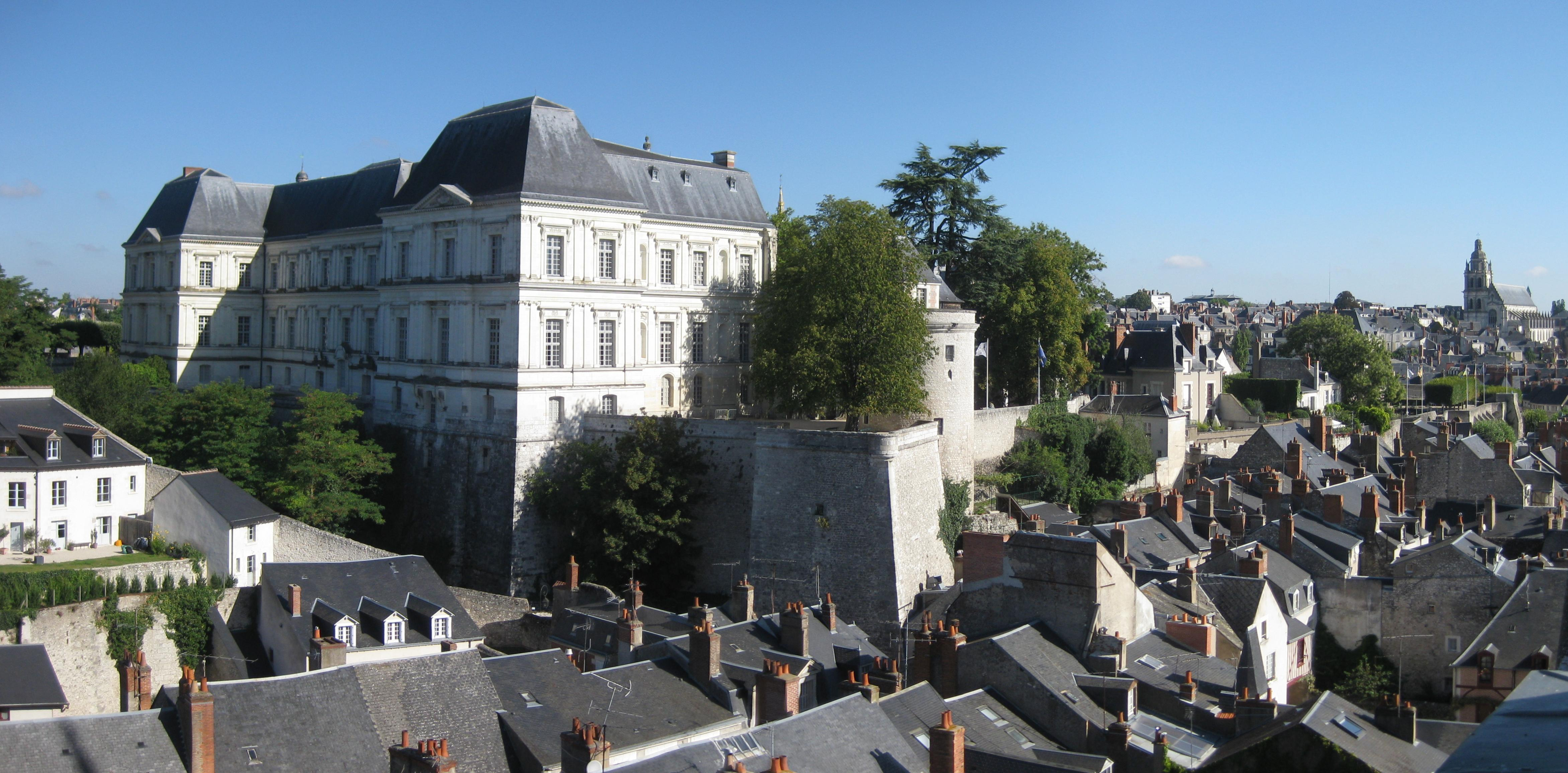 Château de Blois - Vue depuis le sud .